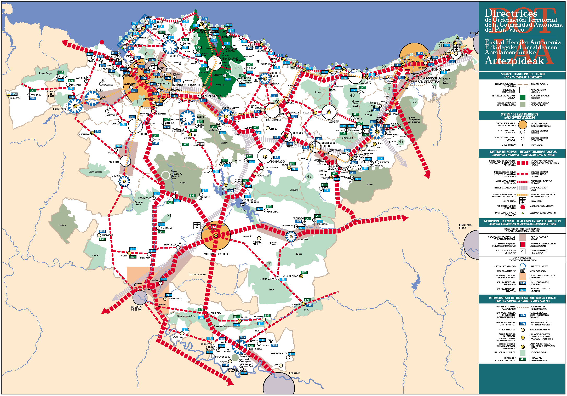 EAEko Lurraldearen Antolamendurako Artezpideen laburpen-planoa, 1997.